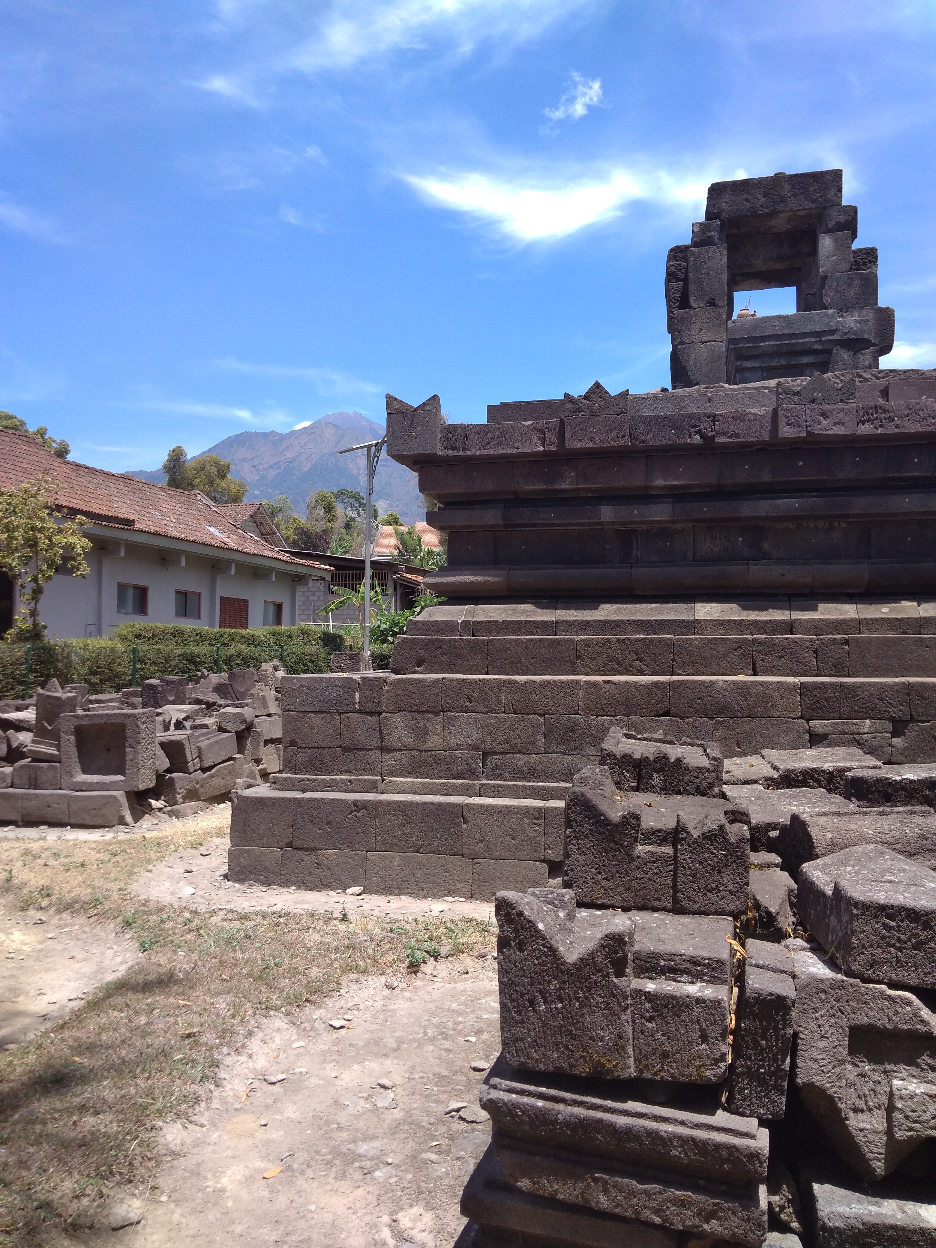 Bagian belakang candi induk di kompleks Candi Lawang